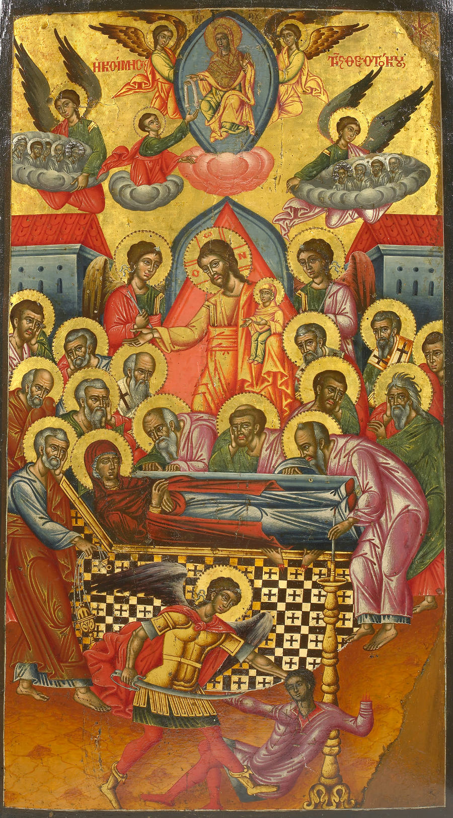 УСПЕНИЕ БОГОРОДИЦЫ. Македония, ок. 1800. Дерево, левкас, темпера, золото. 75 x 33 см. см. Частное собрание